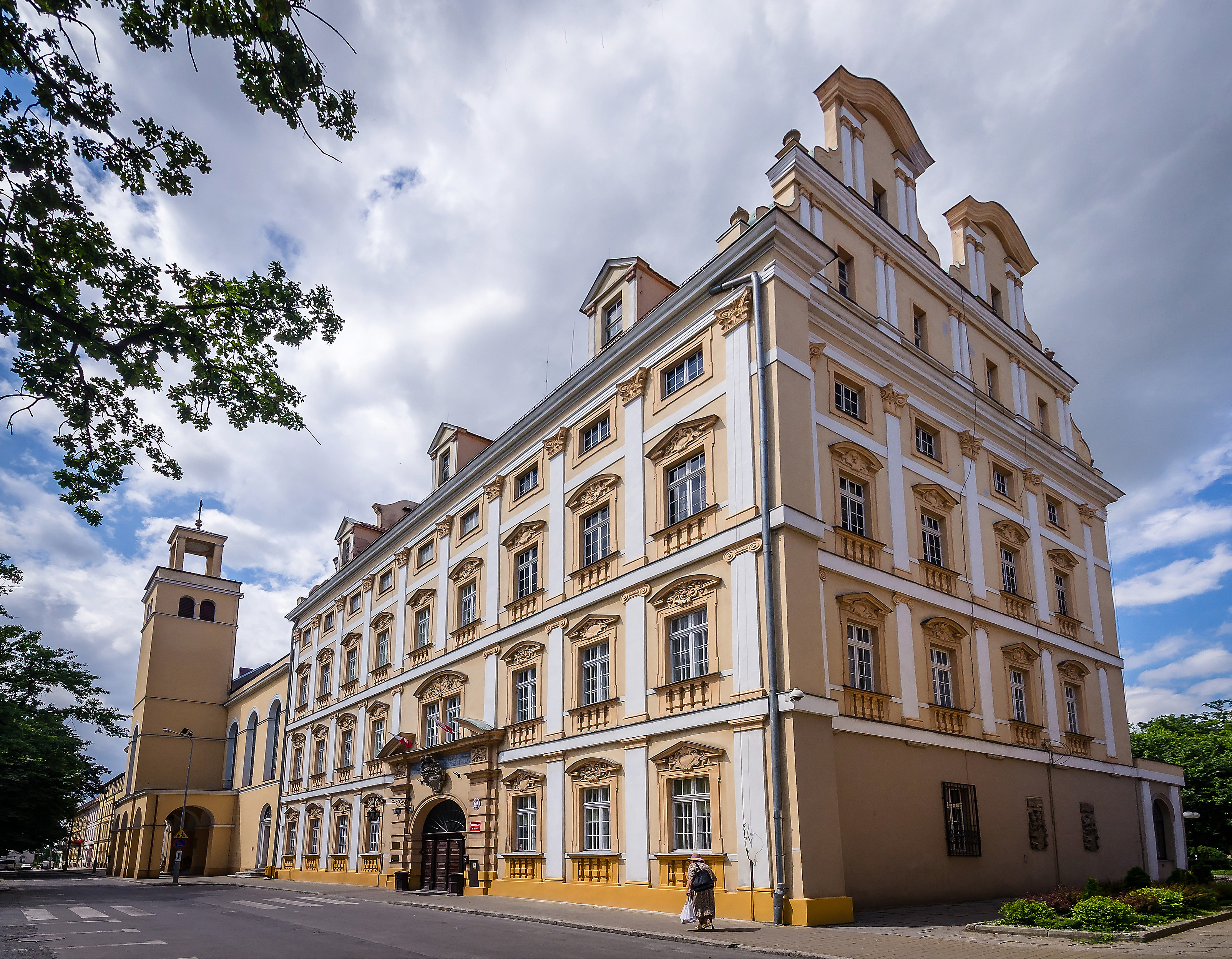 Oława, Urząd Miasta This photo of Lower Silesian Voivodeship was taken during Wikiexpedition 2013 set up by Wikimedia Polska Association.You can see all photographs in category Wikiekspedycja 2013.